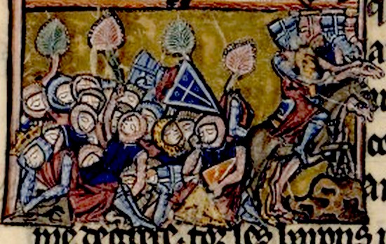 Bataille d'Ager Sanguinis (1119)